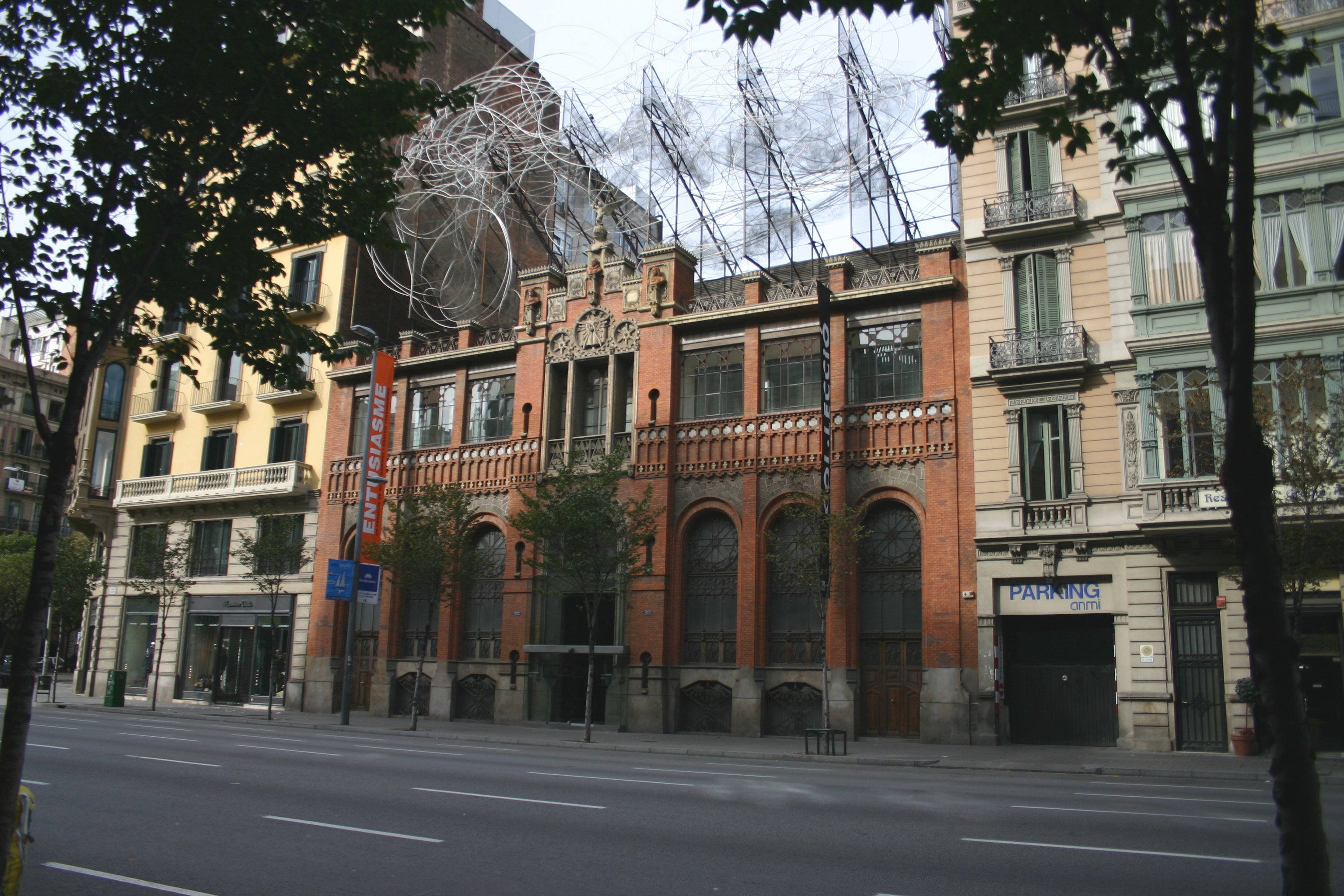 Editorial Montaner i Simón Note: Architect:Lluís Domènech i Montaner City:Barcelona